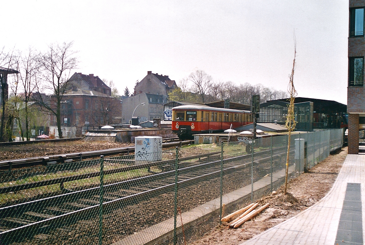 Ausfahrender Zug der BR 477 in Richtung Oranienburg. Rechts im Bahnhof eine BR 480